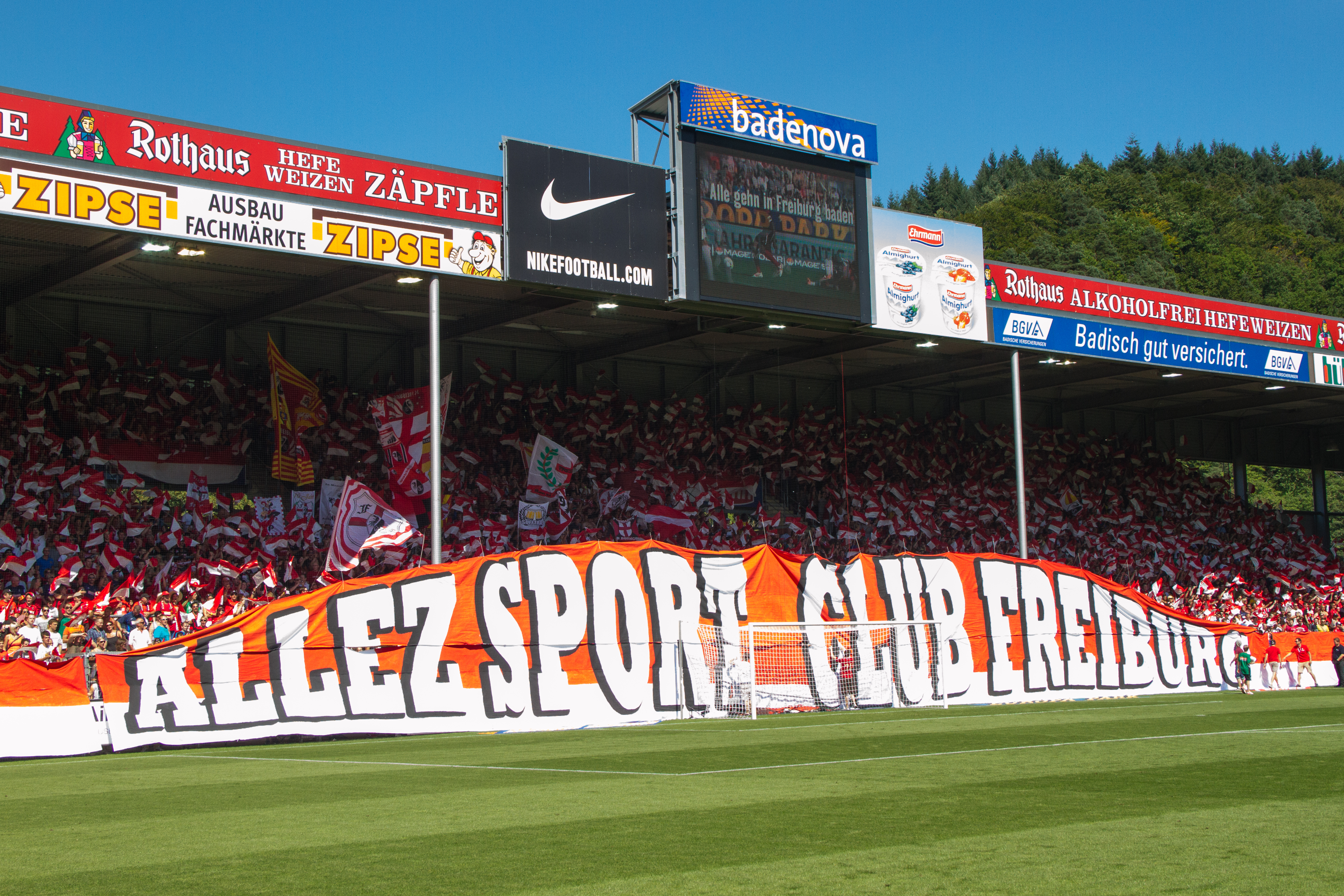 SC Freiburg vs FSVMainz 17 août 2013